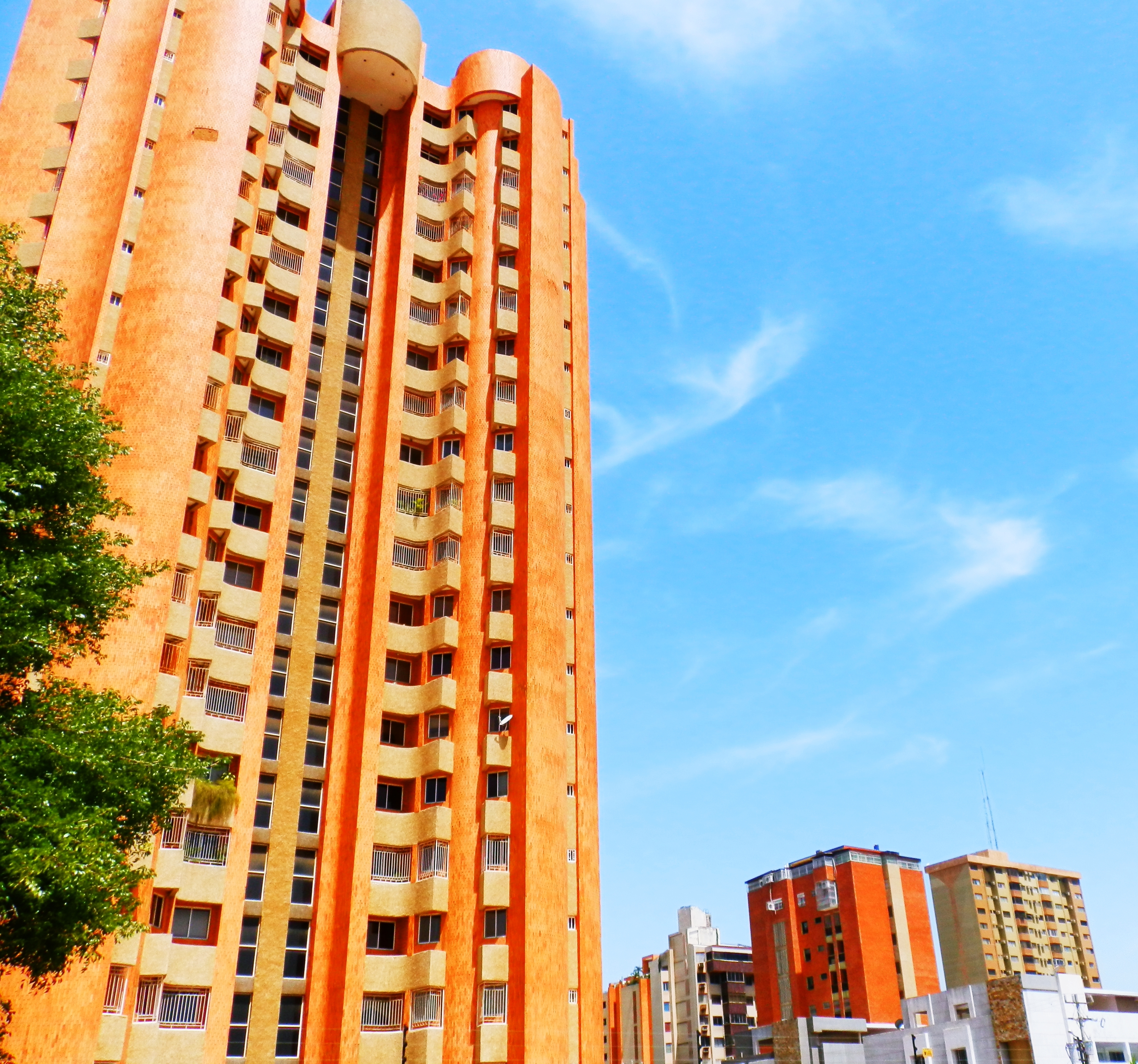 Edificio en el sector Indio Mara, Maracaibo